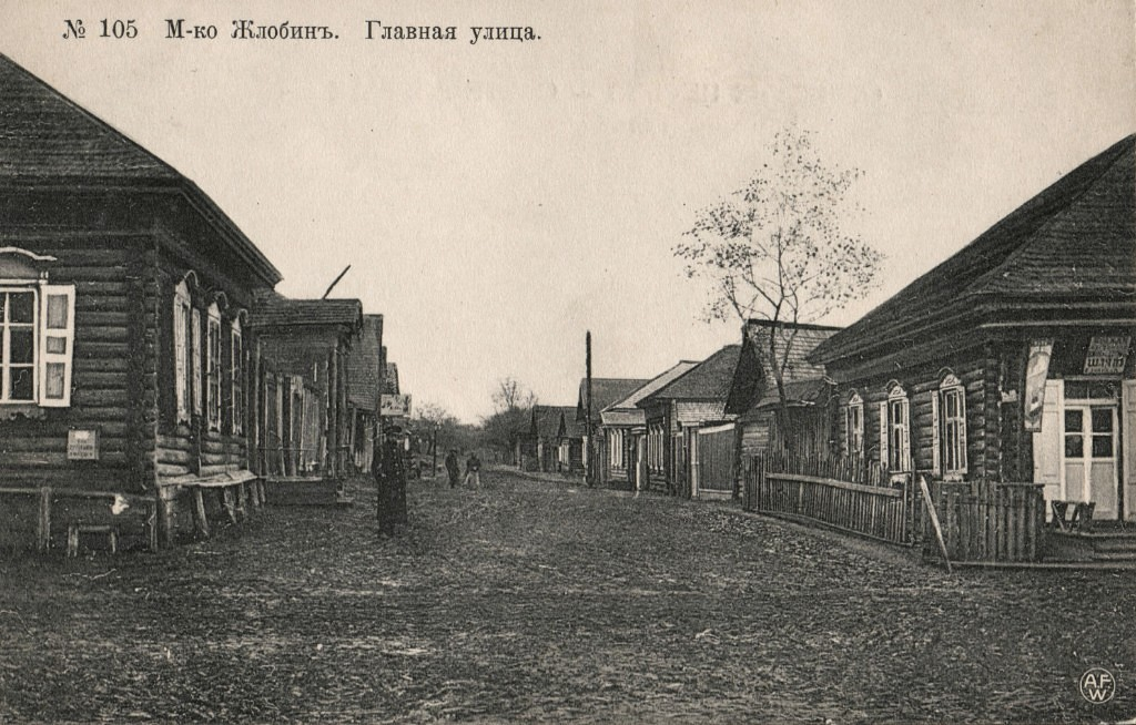 Беларуская (тарашкевіца): Жлобін (Žłobin), вуліца Галоўная (vulica Hałoŭnaja)